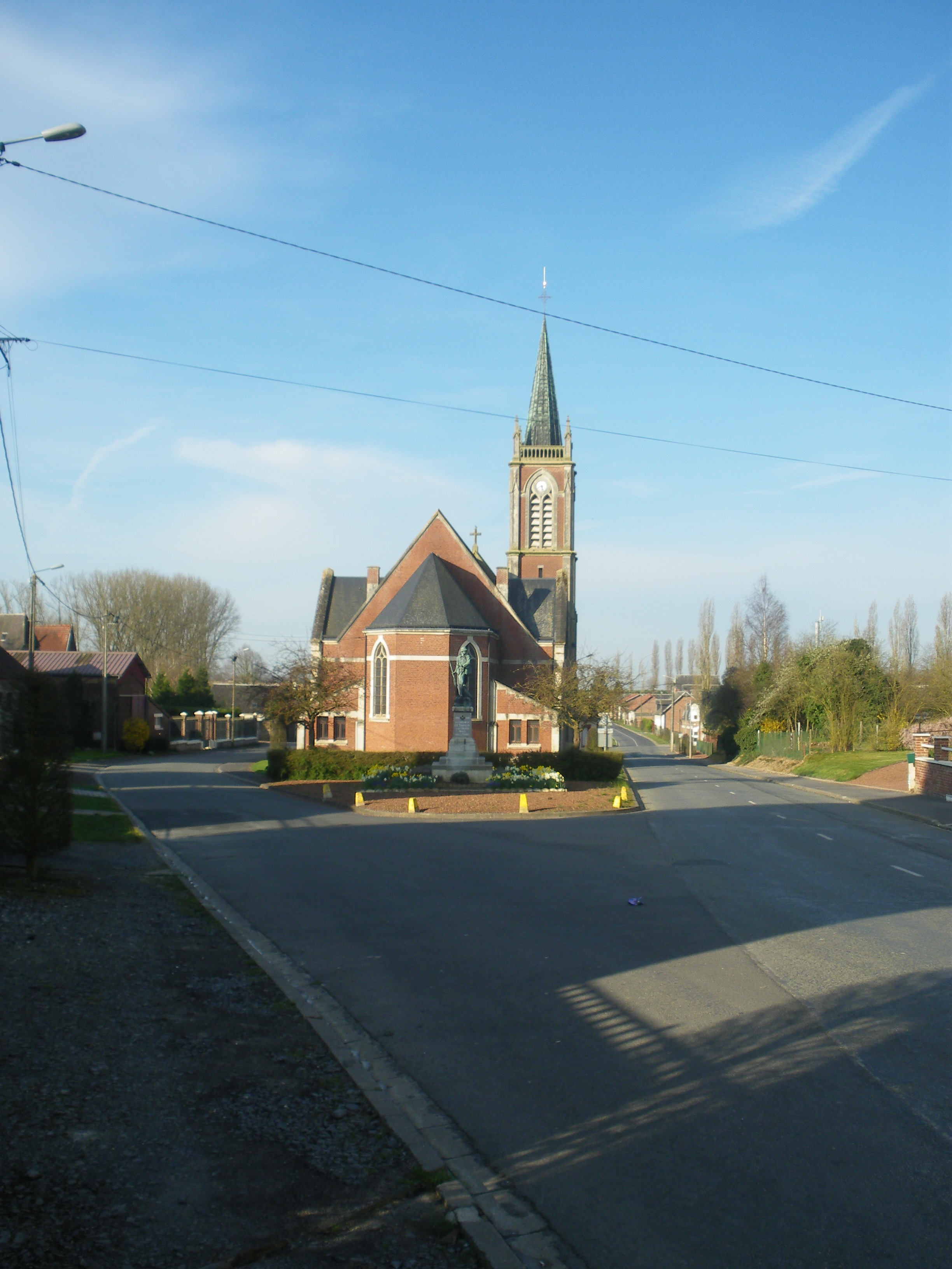 Vue du centre de la commune du Transloy.